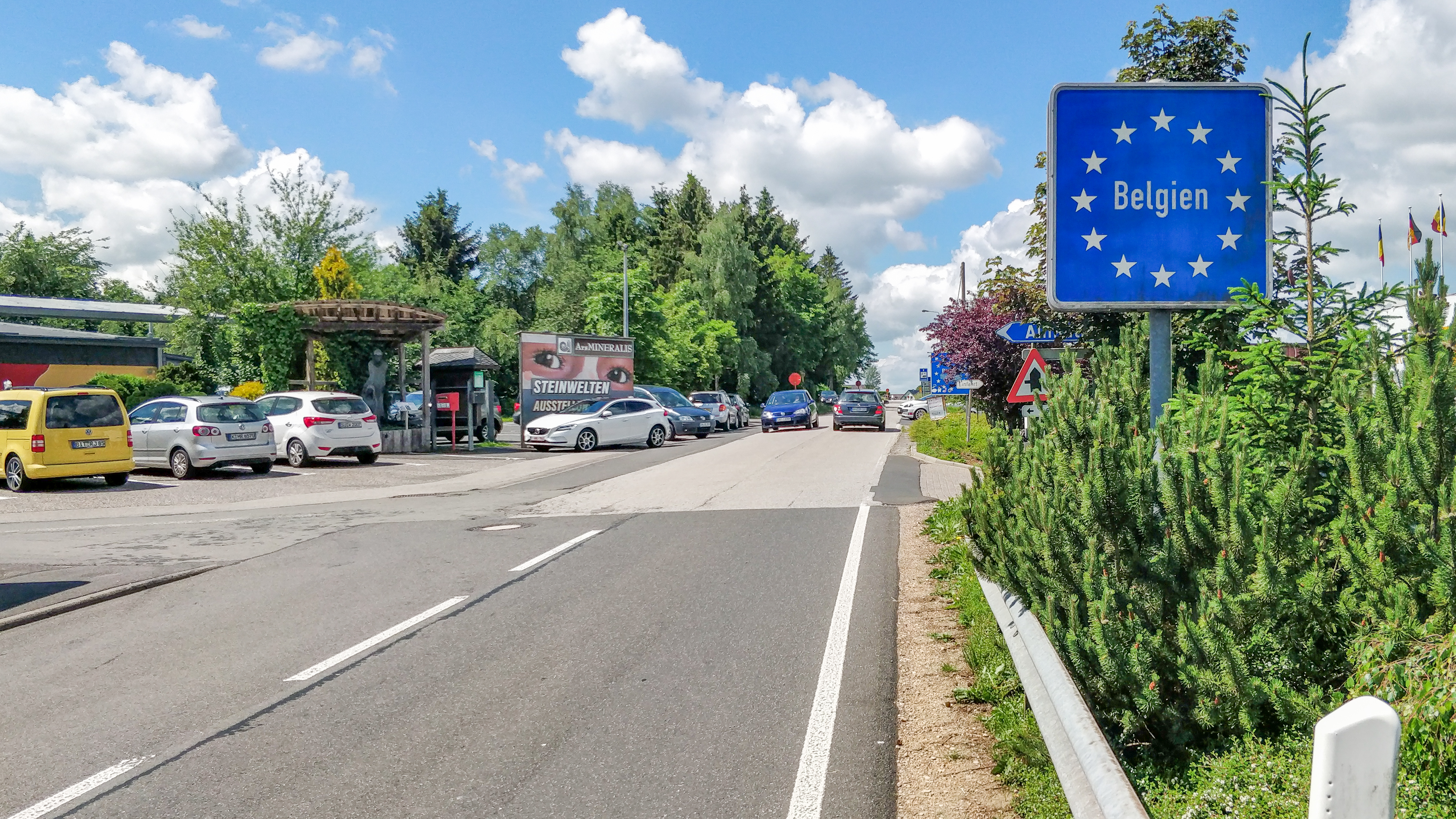 Deutsch-belgische Grenze Losheim (Gemeinde Hellenthal, Deutschland) - Hergersberg (Gemeinde Büllingen, Belgien). Auf belgischer Seite die N634